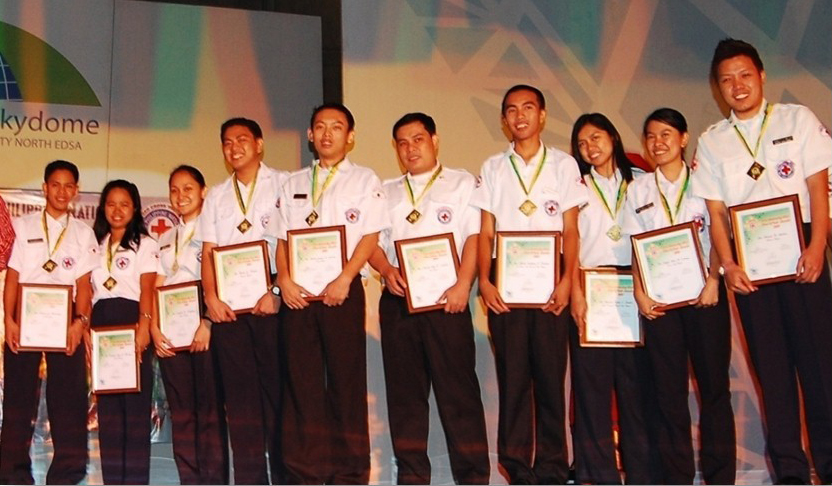 TORCY 2009 Awardees